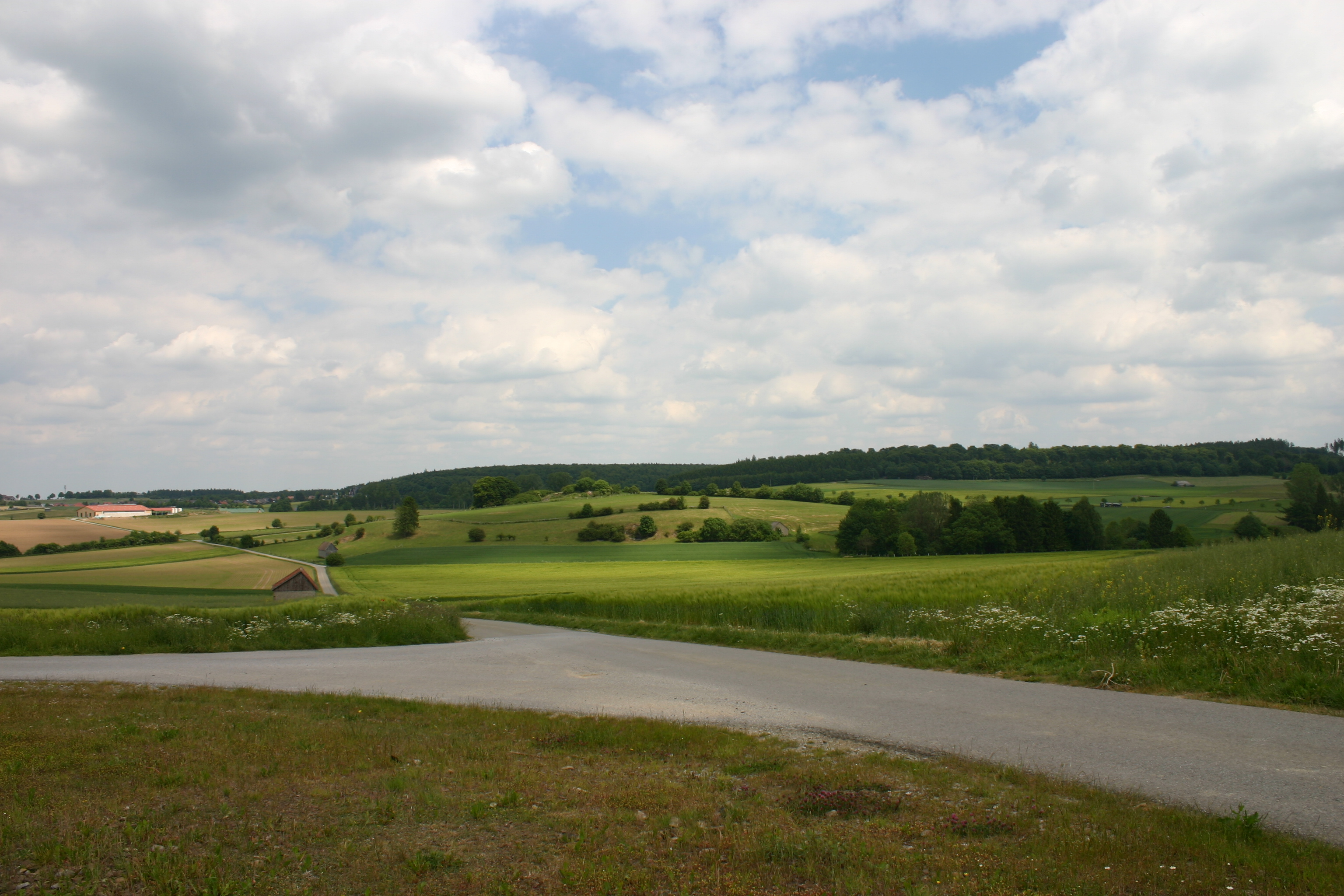 Landschaftsschutzgebiet Briloner Hochfläche; Blick Richtung Nordost; links oben sind Bauten von Bleiwäsche zu sehen.